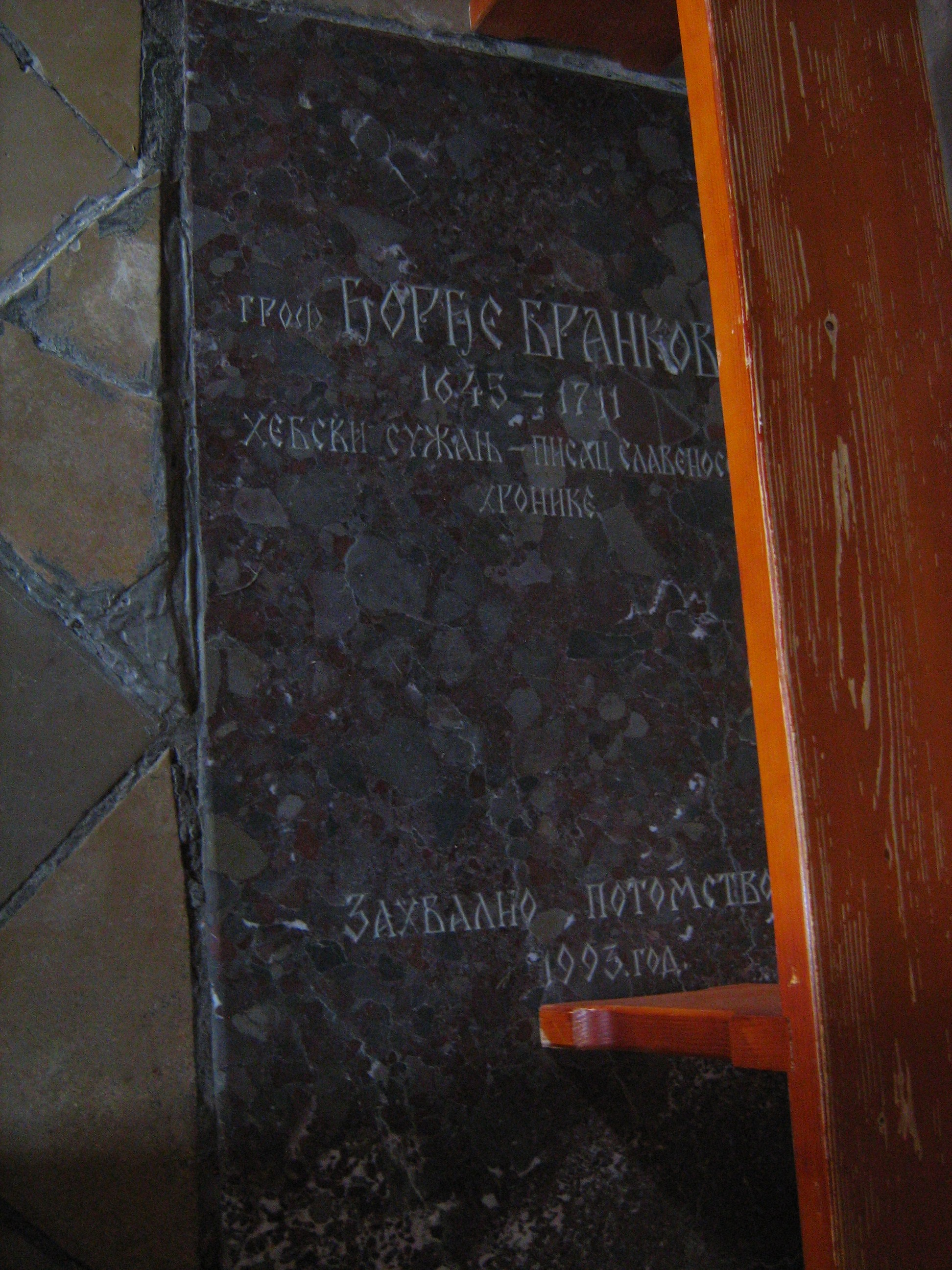 гроб грофа Ђорђа Бранковића у цркви